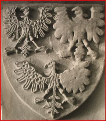 Sculpture en bas-relief de l’écu de Guy de Brimeu dans la nef de l'église de Querrieu, dont il a été le fondateur, vers 1500.